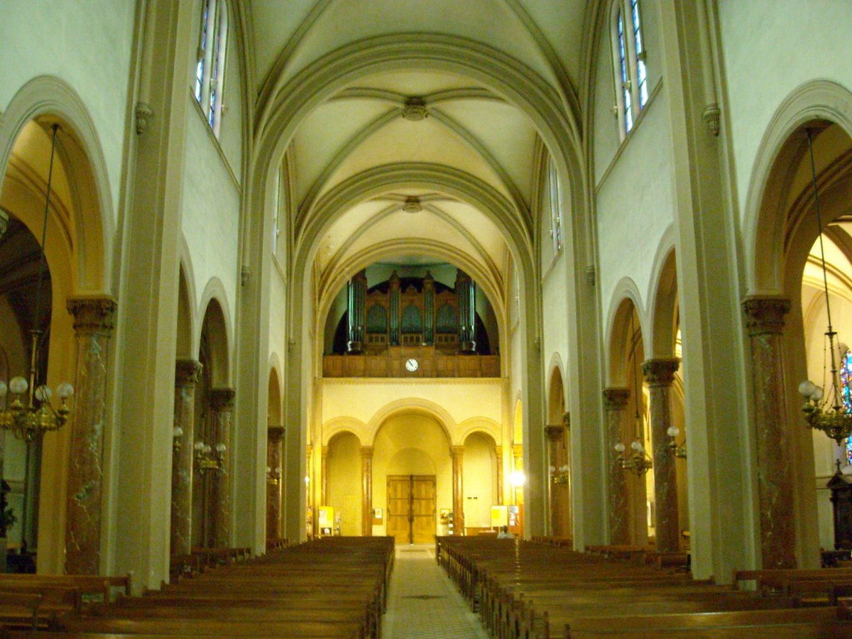 Nef de l'église Notre-Dame de Clignancourt depuis le chœur